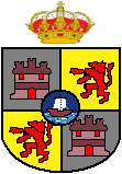 Escudo de la ciudad de Concepción (Paraguay).